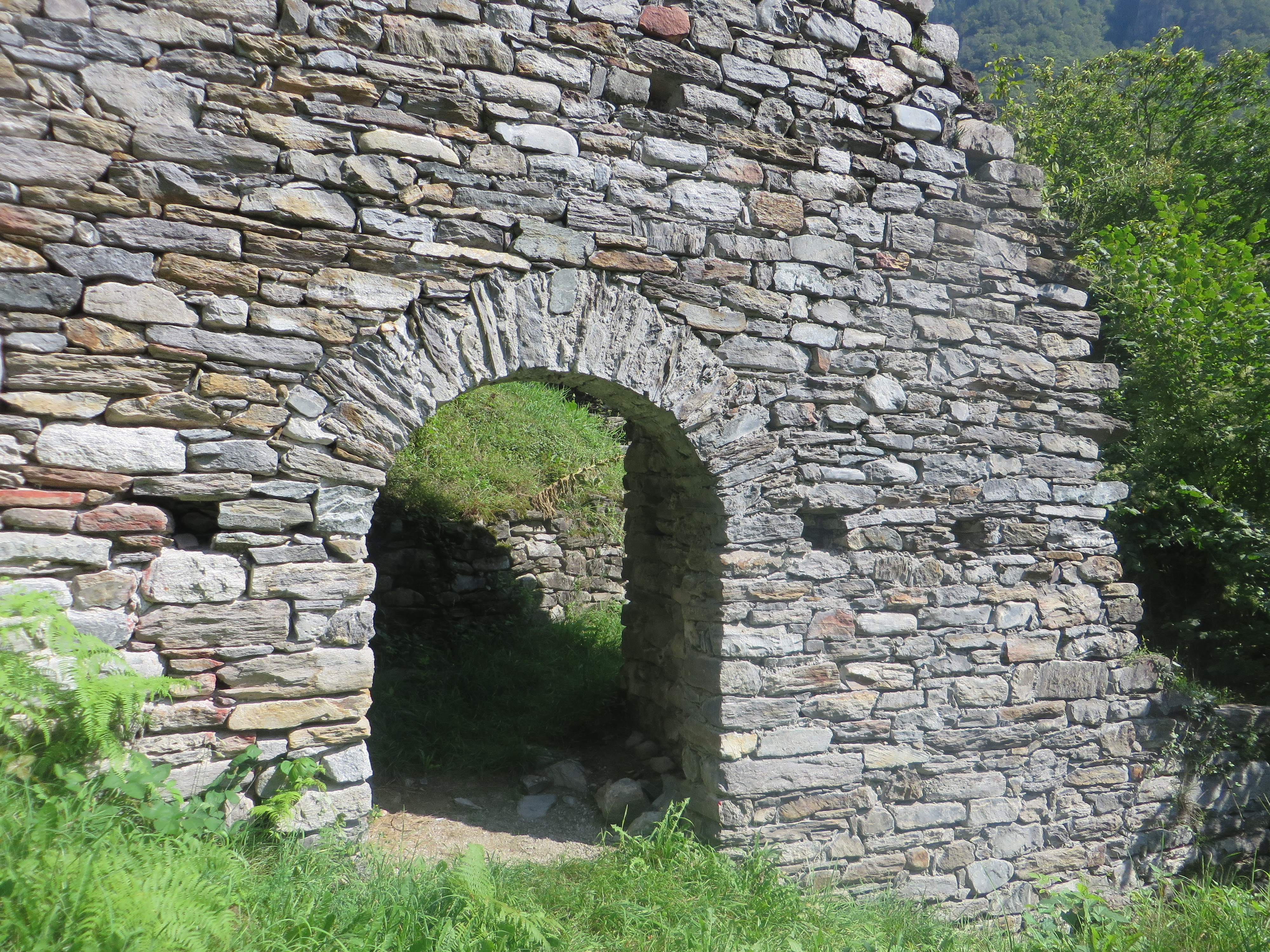 Particolare del castello di Narantola (Cama)